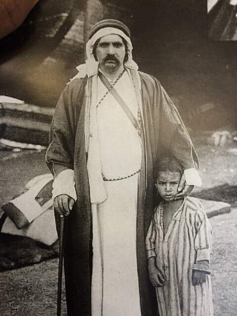 الأمير النوري الشعلان وأبنه نواف حاكم الجوف لاحقا.